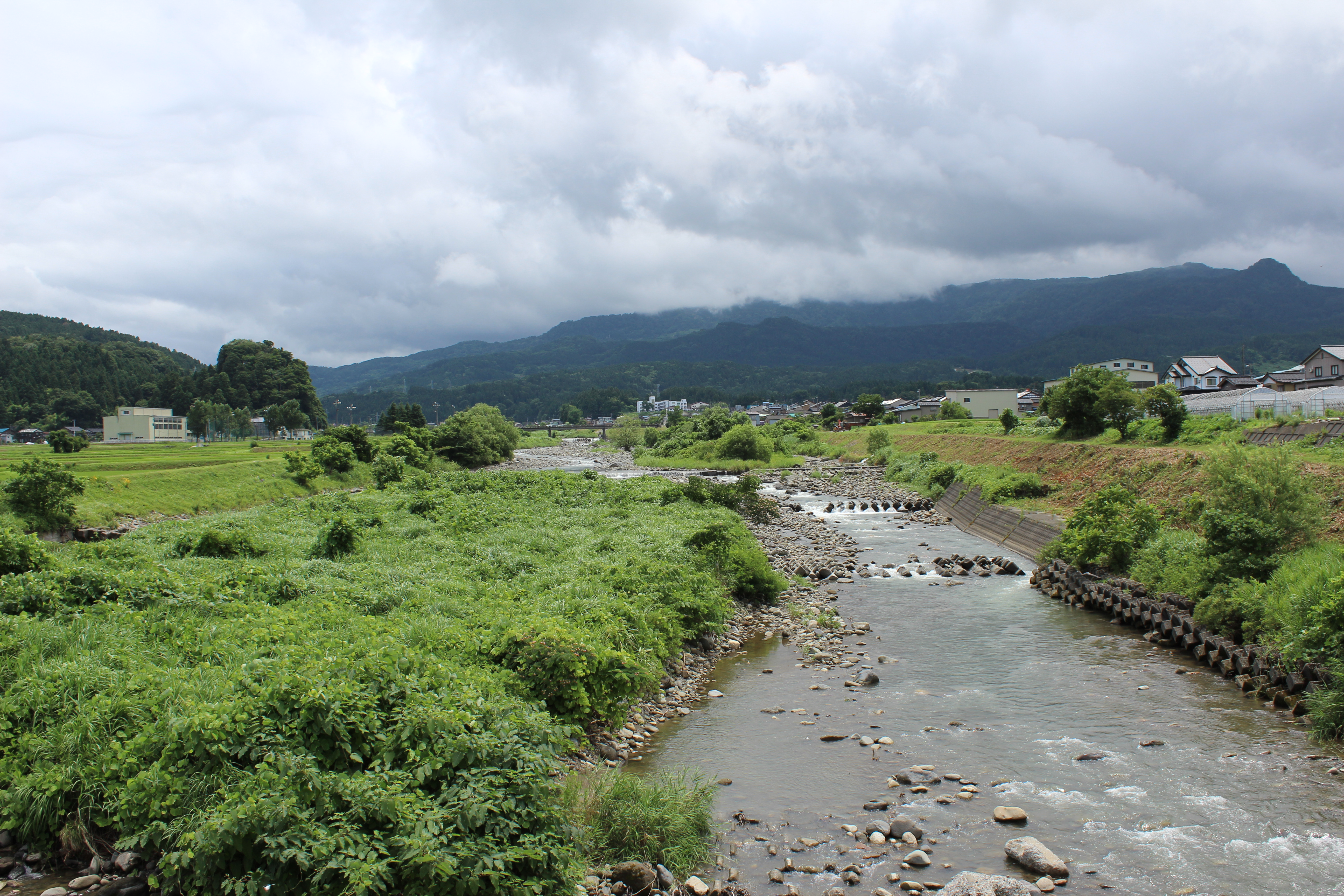 早川。新潟県糸魚川市大字堀切。東海大橋（ひがしうみおおはし）より上流方向撮影。